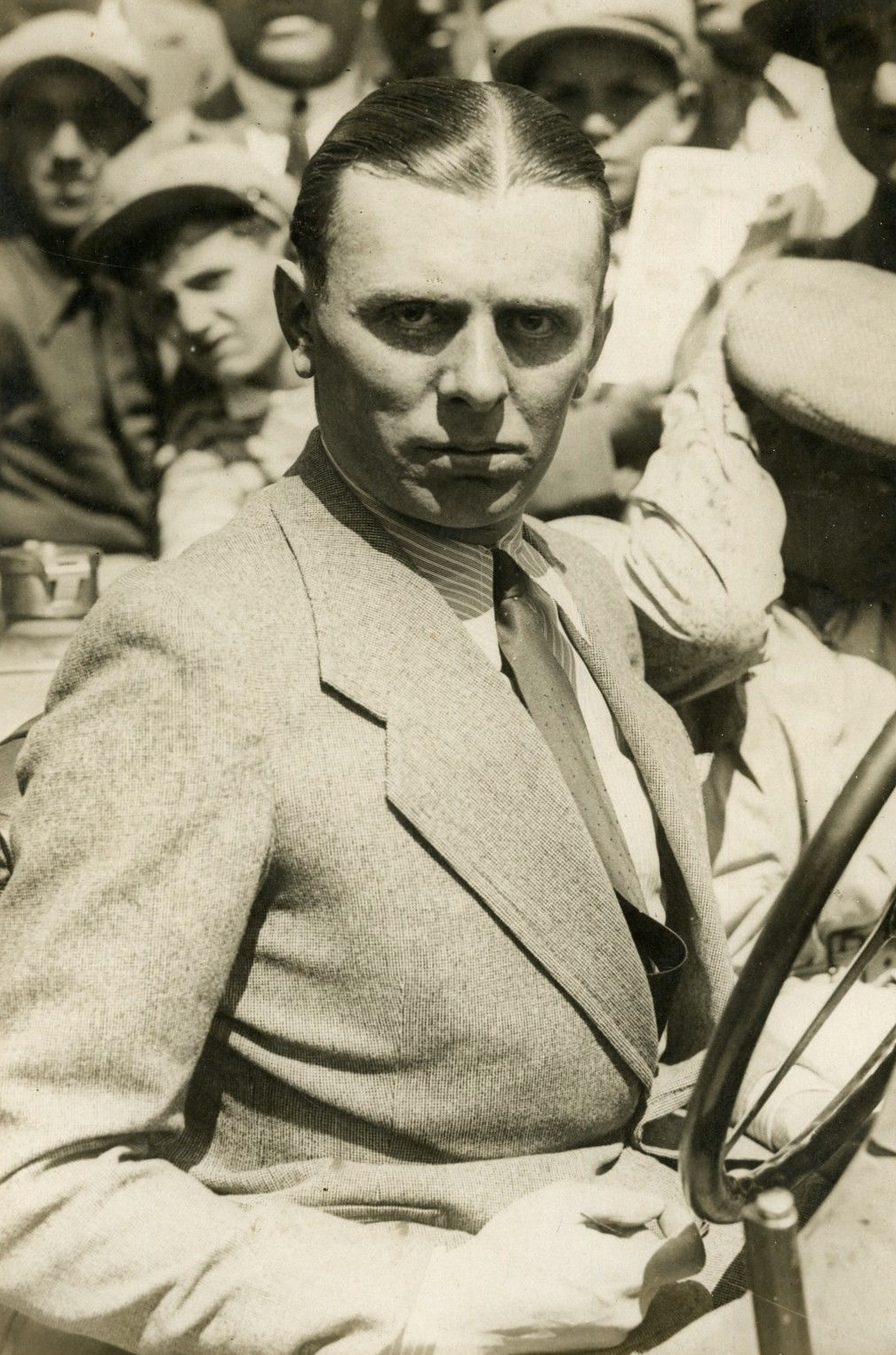 "VARZI vainqueur s/BUGATTI (A.C.F. 1931)" Photo originale G. DEVRED (Agce ROL)